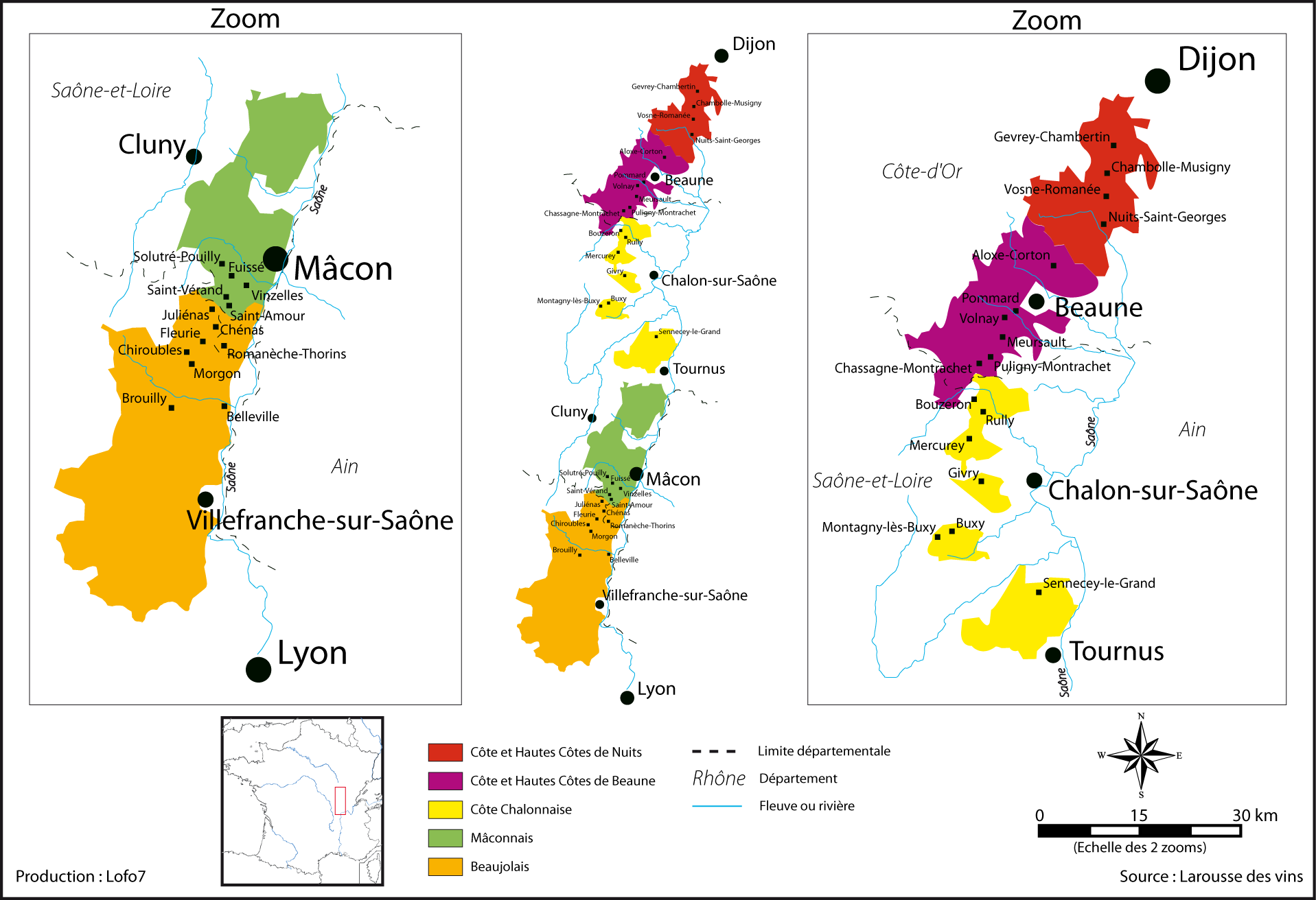 Les vignobles de Bourgogne